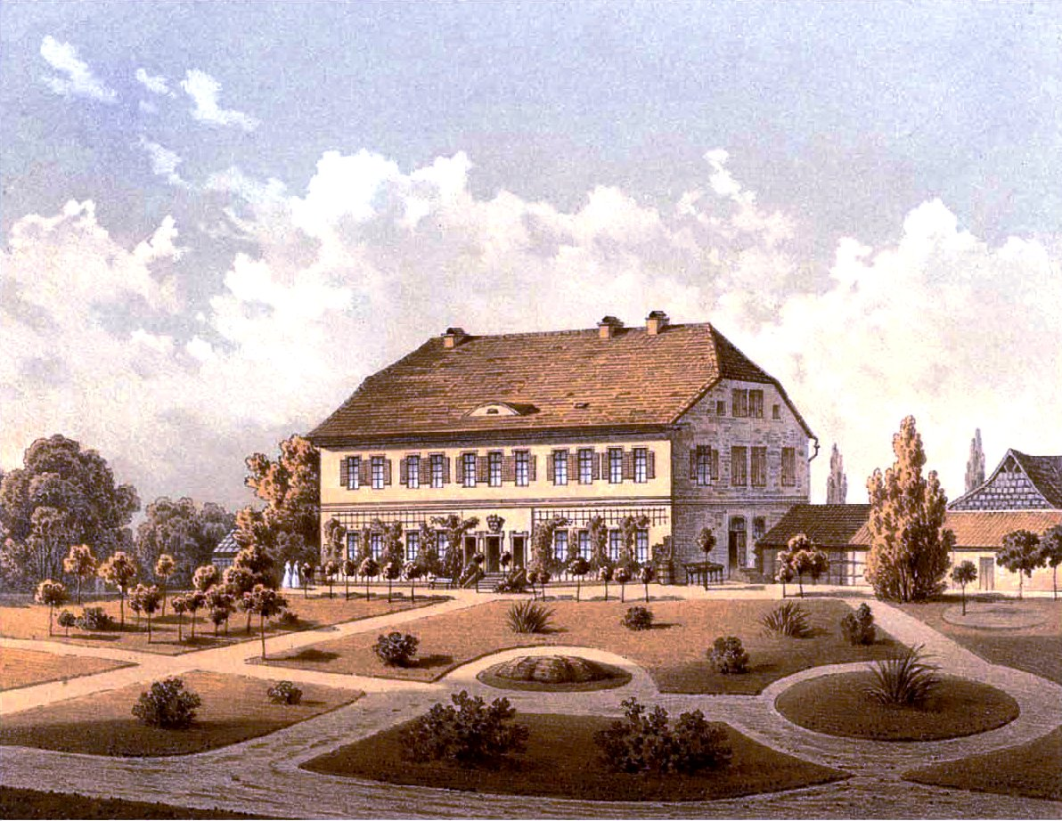 Gut Wehnde, Kreis Worbis, Provinz Sachsen